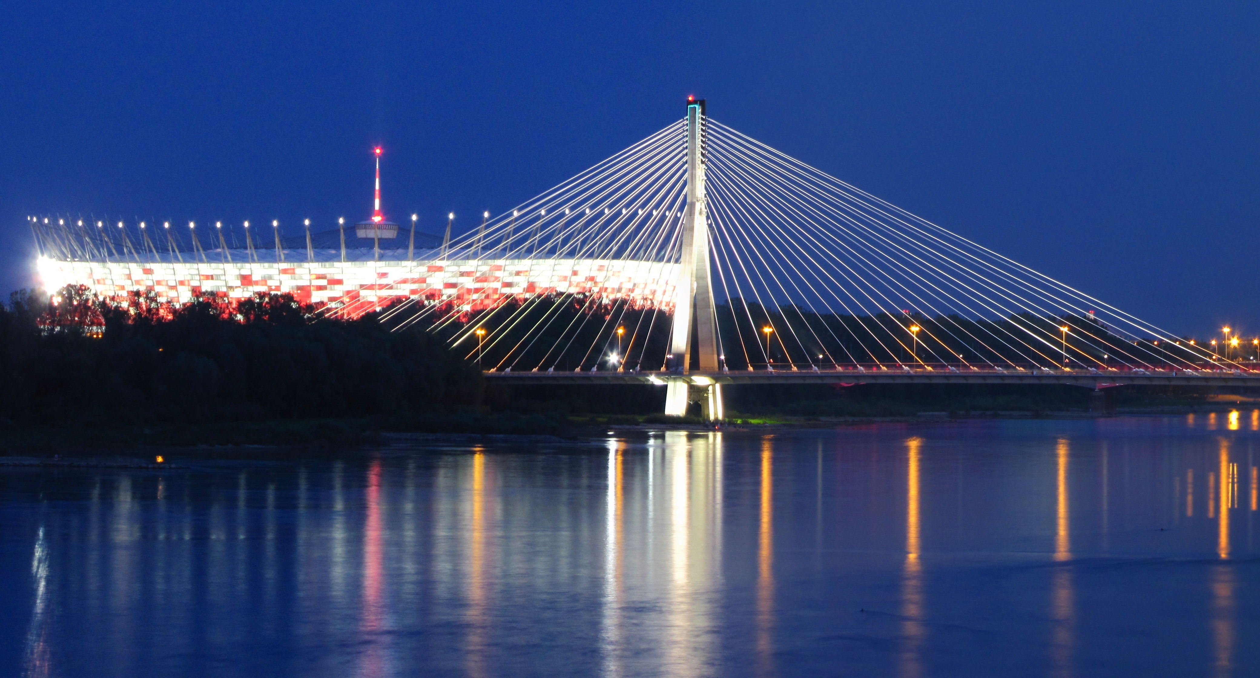 Stadion Narodowy w Warszawie